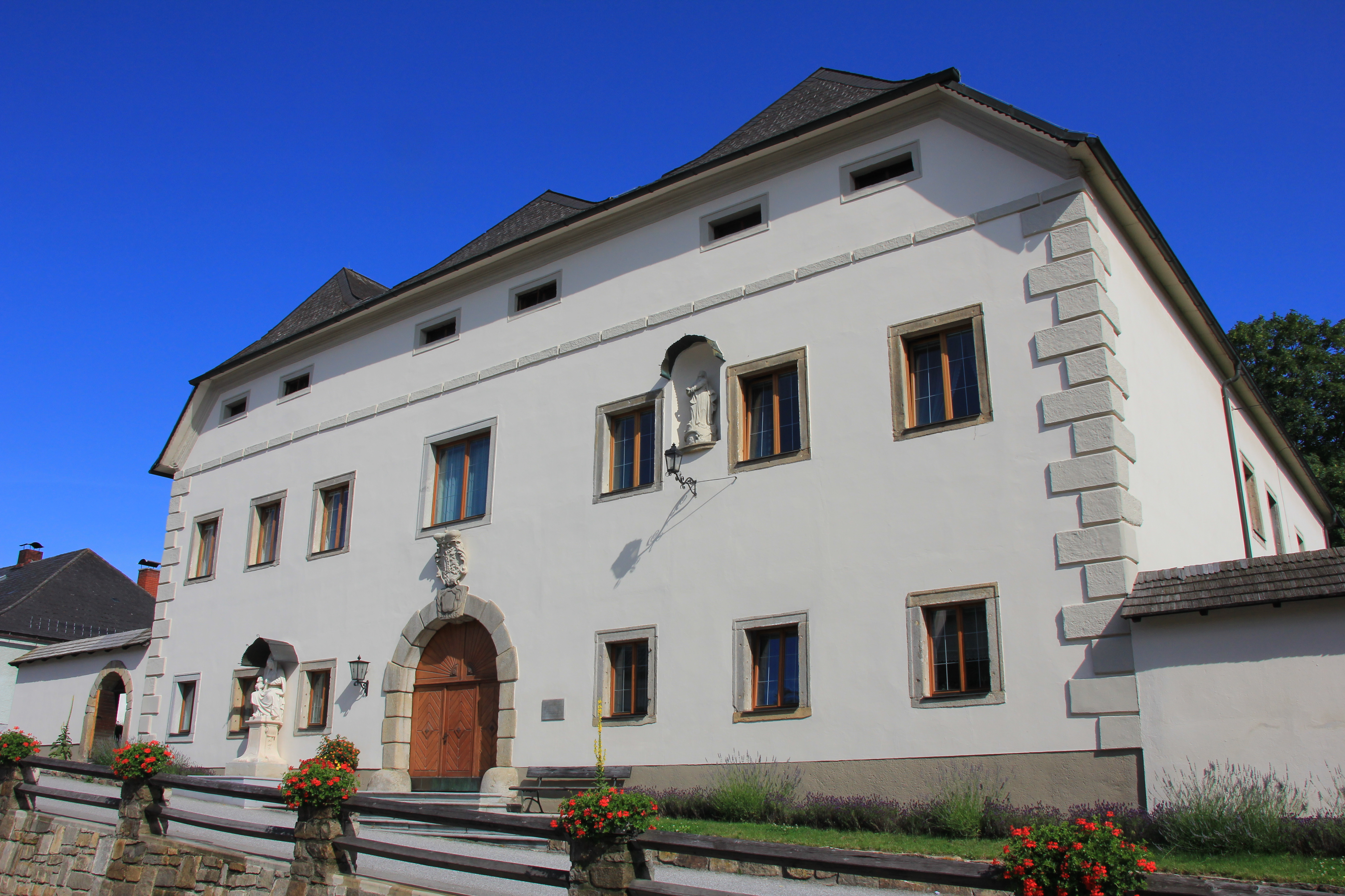 Herrenhaus in Arbesbach, heute Altzingersche Forstverwaltung